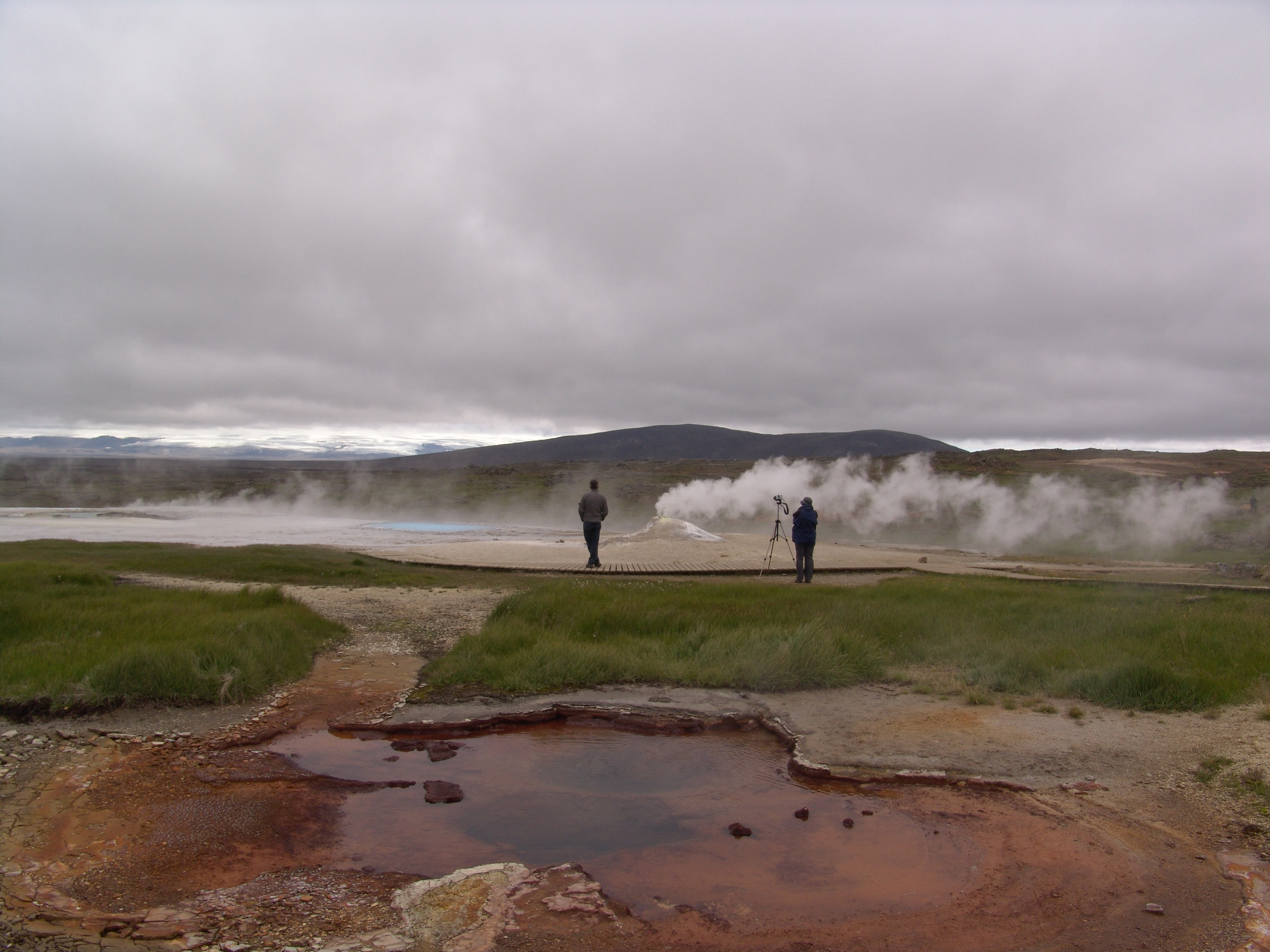 Hot spring in Hveravellir, Island